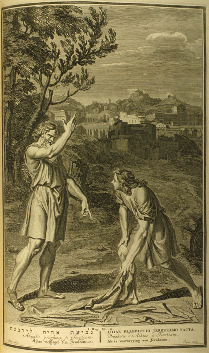 Ahijah's prophesie to Jeroboam